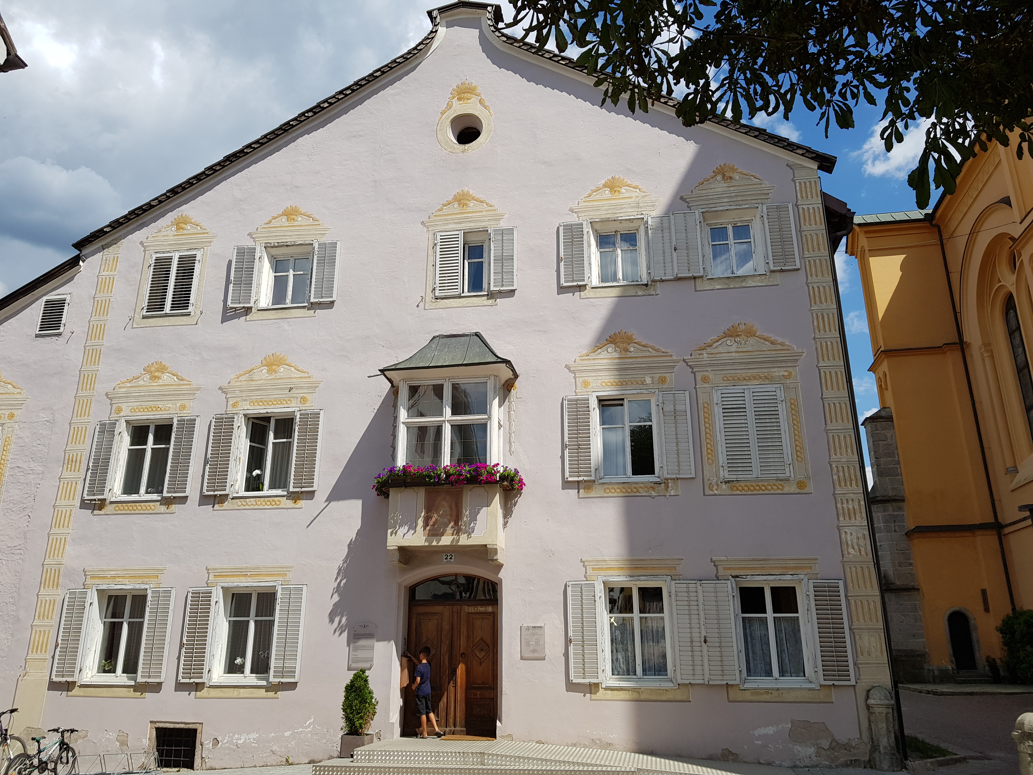 Pfarrwidum, Oberragen, Bruneck, Südtirol